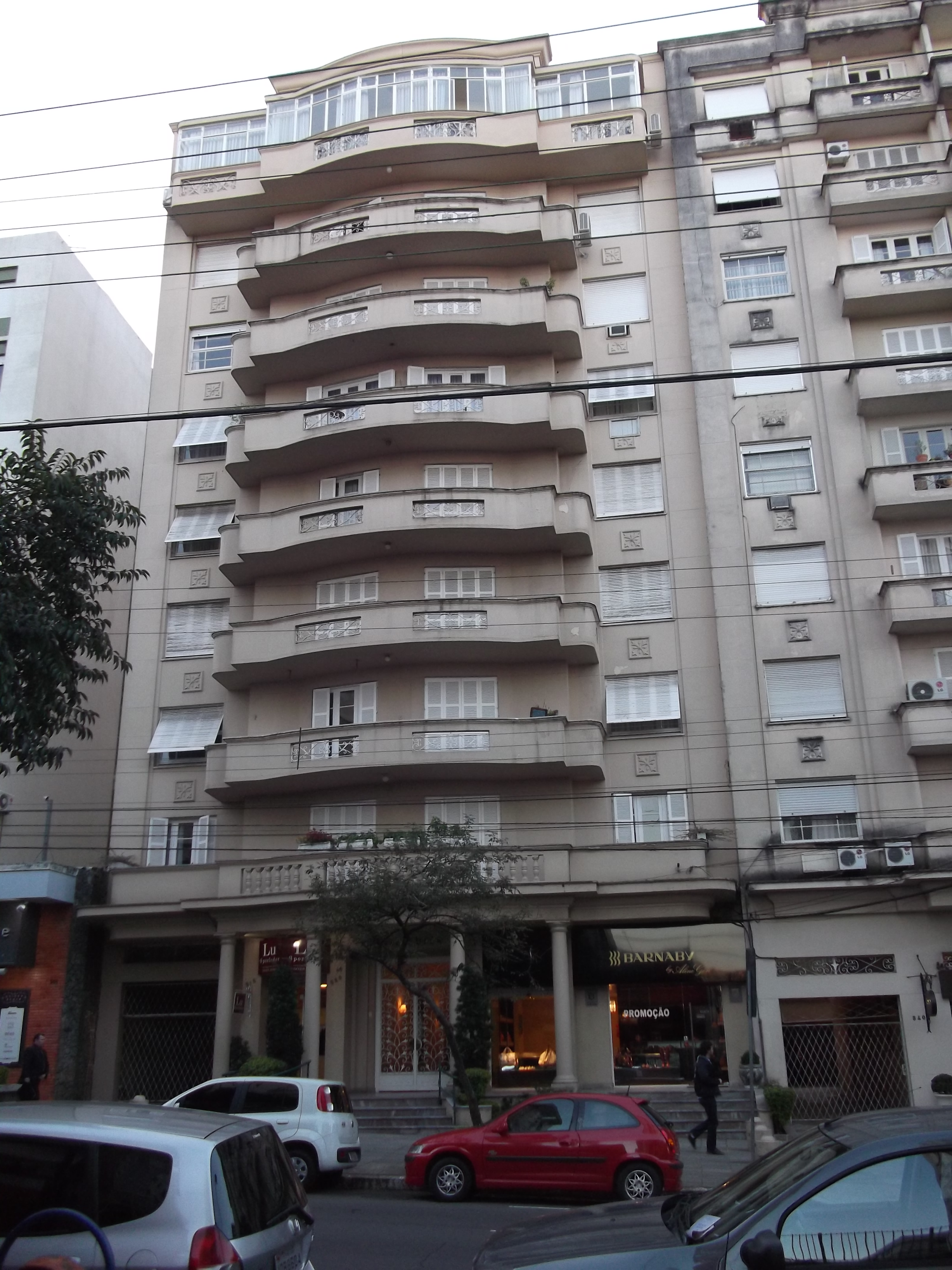 Rua Vinte e Quatro de Outubro n. 520, Porto Alegre, Brasil